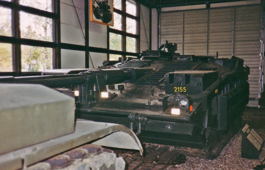 Beschreibung: schwedischer Kampfpanzer (swedish battletank) / Stridsvagn 103 c / Tankmuseum Munster 1998